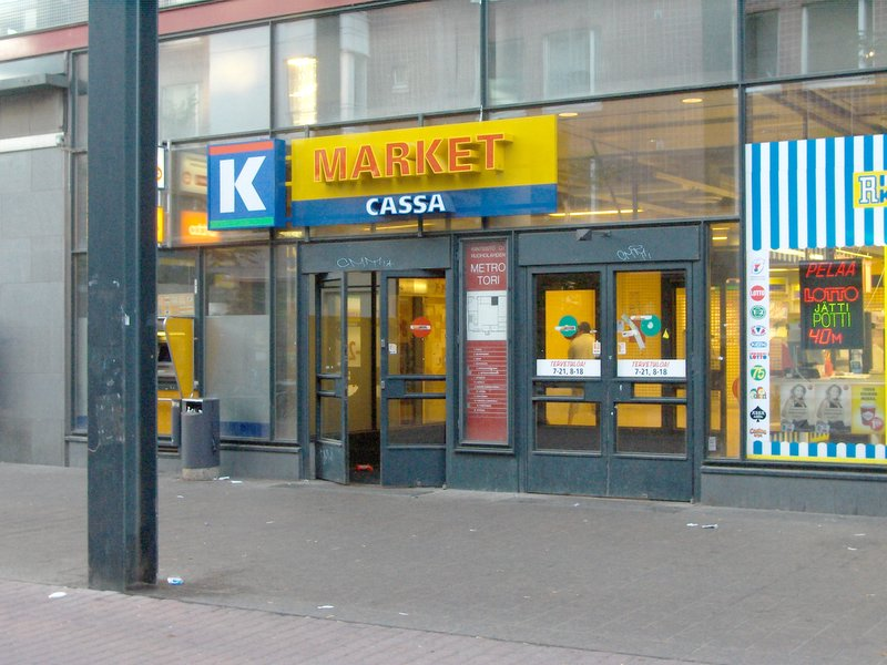 K-market cassa Helsingissä, Ruoholahdessa.